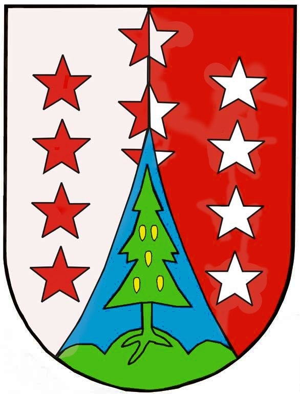 Laterns, Vorarlberg: Ein von Silber und Rot gespaltener Schild, der von einer eingeschobenen, aufsteigenden, eingebogenen, bis zum Schildeshaupt reichenden blauen Spitze durchzogen wird. Der Schild ist mit elf fünfstrahligen Sternen in drei senkrechten Reihen, je vier in jedem Schildesfelde, und drei – deren unterster durch die Spitze zerspalten wird – etwas erhöht auf der Teilungslinie, alle in gewechselten Tinkturen, belegt. In der Spitze erhebt sich aus der erhöhten Mittelkuppe eines grün bewachsenen Dreiberges eine natürliche, bewurzelte, golden befruchtete Tanne. Den Schild umgibt eine schwarze Randeinfassung. (Verleihung: 22. Juli 1938)